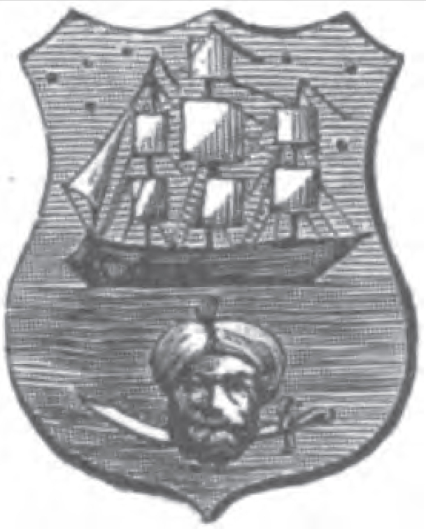 "BARCELÓ. El ilustre linaje de Barceló tiene su casa solar en el Principado de Cataluña, siendo sus armas un navio flotante con el àrbol, entenas timon y jarcias de oro, y las velas de plata, sobre el mar; en el campo un celage con estrellas de plata; en la barba del escudo una cabeza de moro flotante sobre las aguas atravesada de un alfange ó tajante." Don Juan José Vilar Psayla cronista y rey de armas de S.M. católica la reina doña Isabel II (Madrid, 1867), Linajes nobles de España: catálogo de todos los apellidos y escudos de armas que a cada uno pertenecen, p.109